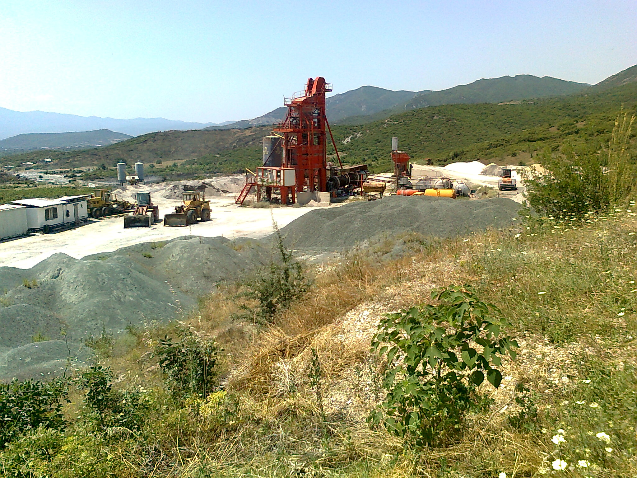 Tatarli Čuka mine